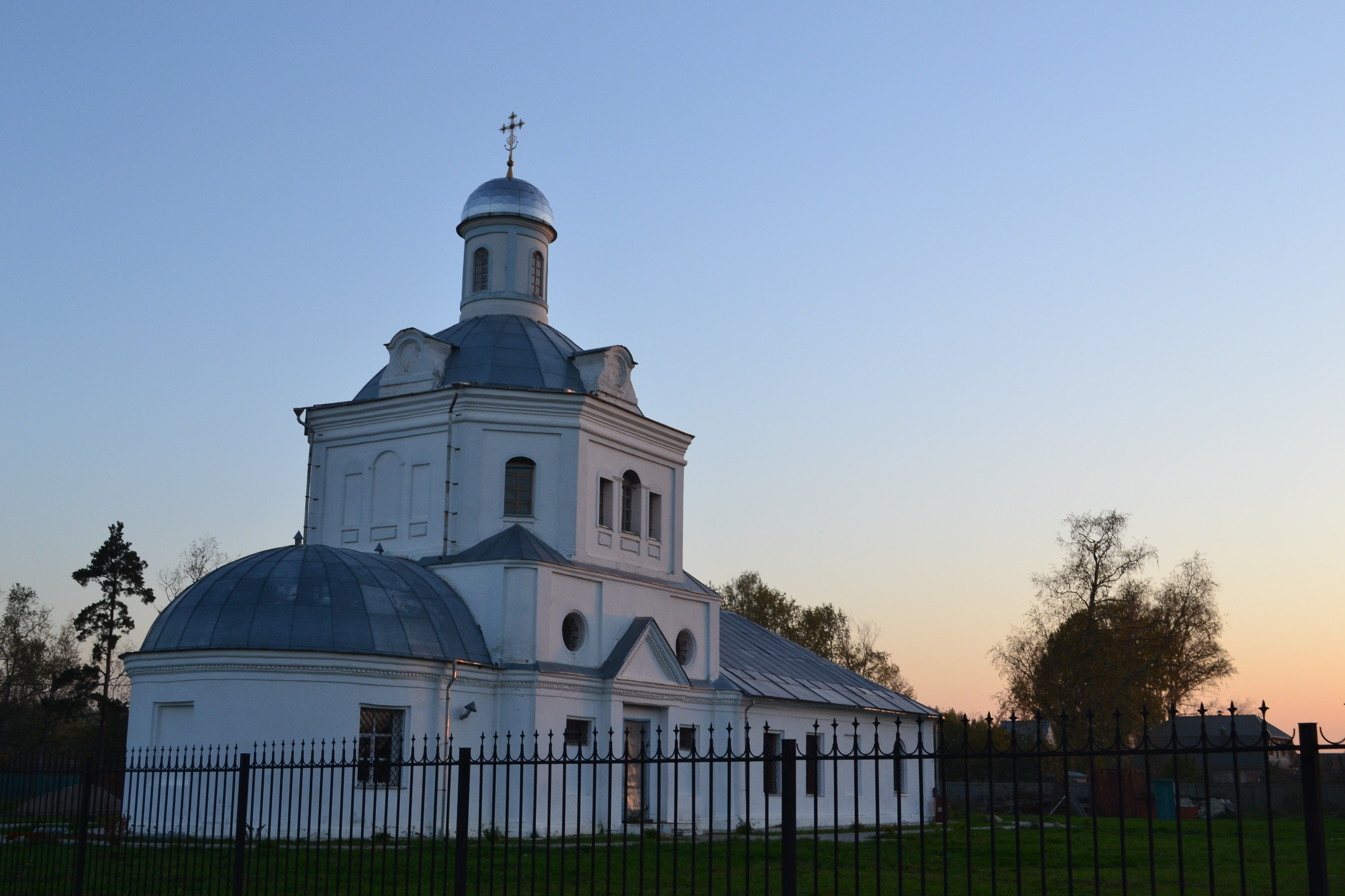 Церковь Иоанна Богослова: Афанасьево, Александровский район, Владимирская область